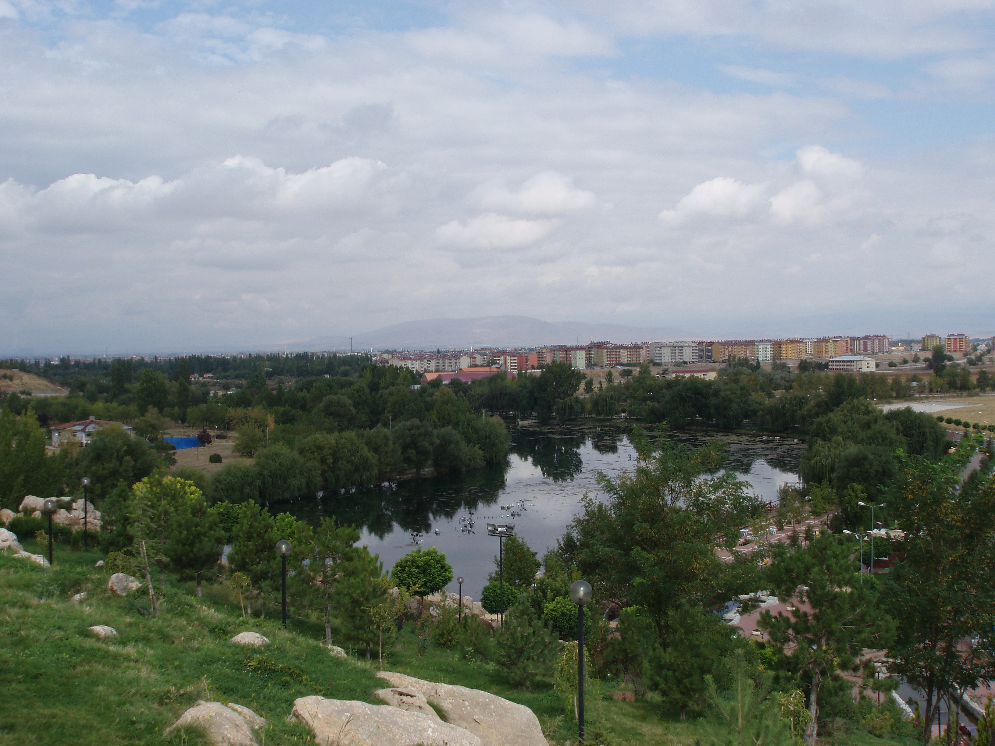 Elbistan